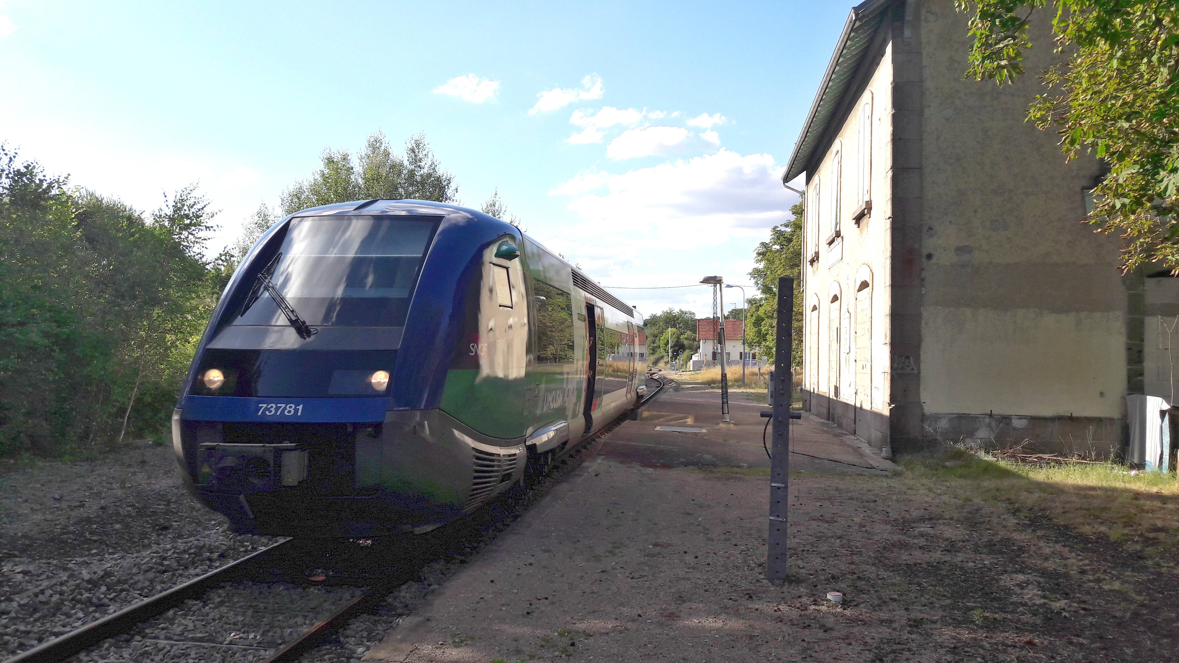 Arrêt du TER n°868 712 en provenance de Limoges Bénédictins et à destination de Felletin 18:39